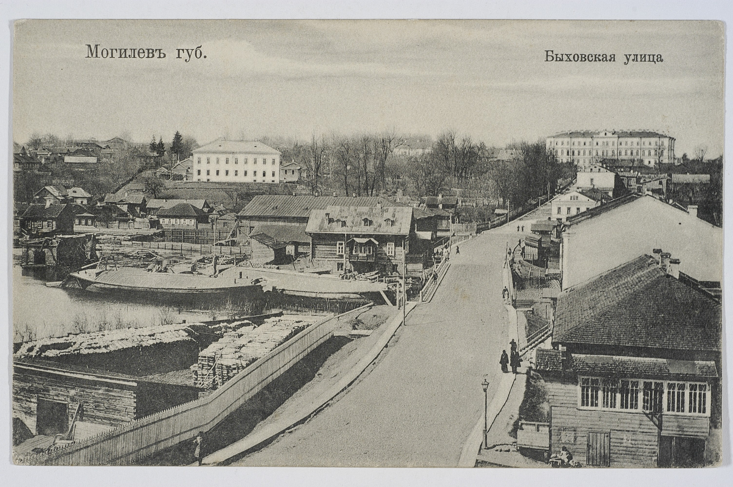 Беларуская (тарашкевіца): Магілёў (Mahiloŭ), вуліца Быхаўская (vulica Bychaŭskaja)